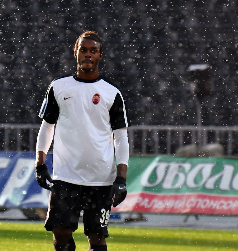 Франк Мадоу — ивуарийский футболист.